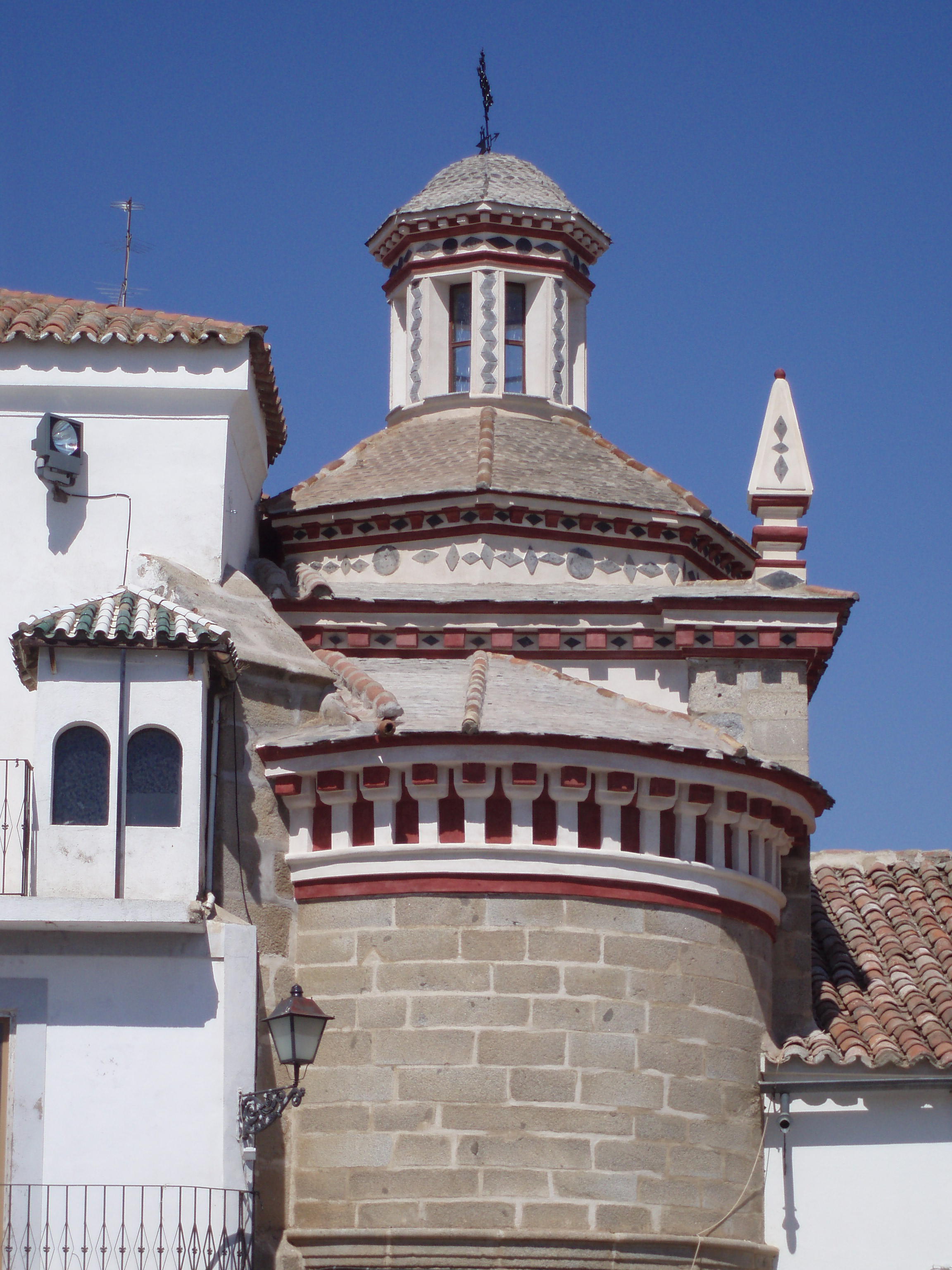 Detalle de vista exterior del Camarin de la Ermita de la Virgen del Castillo de Hinojosa ddel Duque